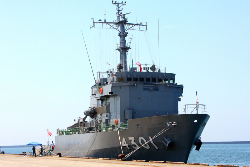 支援艦ひうち。酒田港に繋留中。